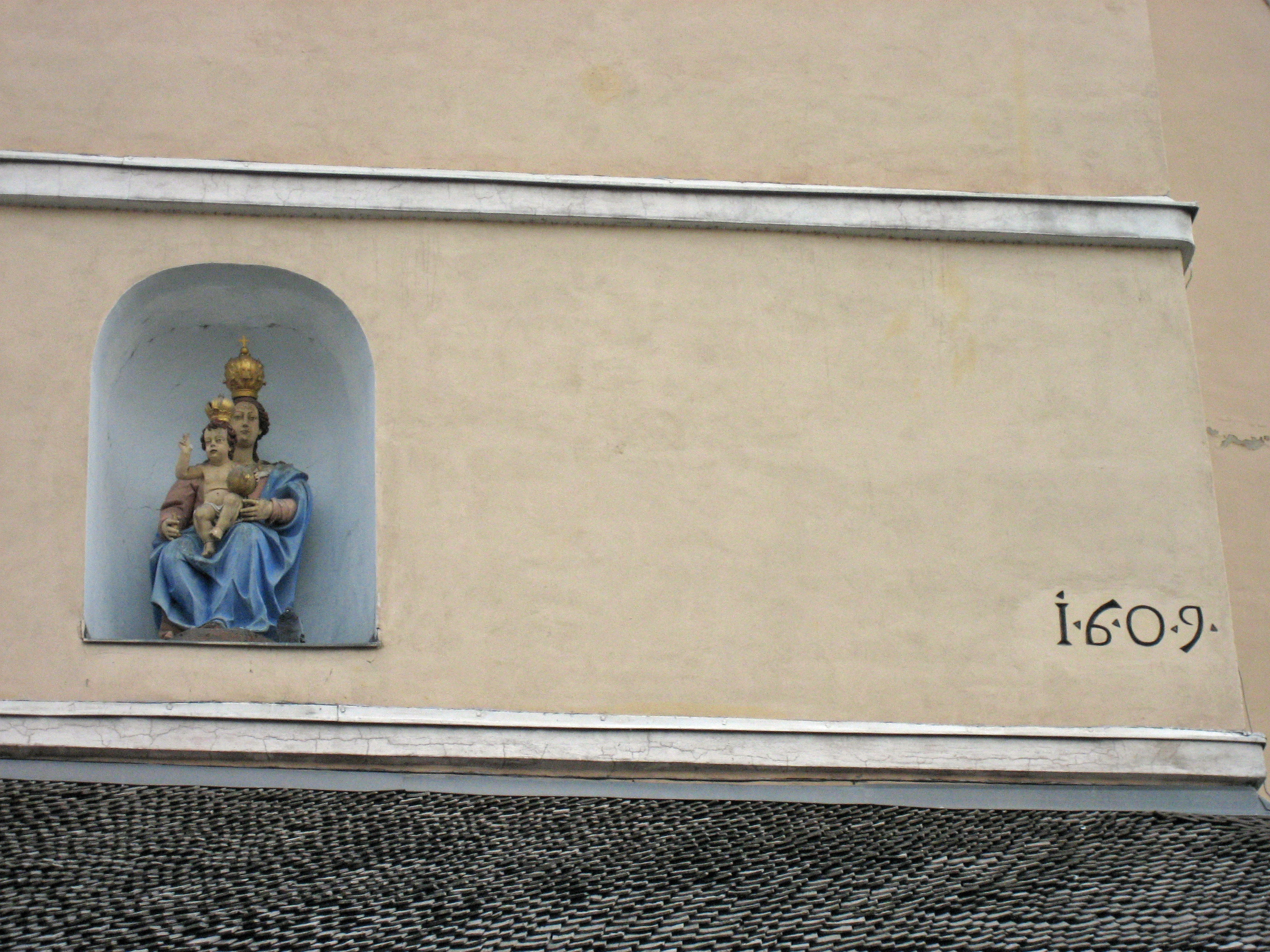 Wallfahrtskirche Maria Trost in Fernitz, Steiermark, Österreich / Church Maria Trost in Fernitz, Styria, Austria